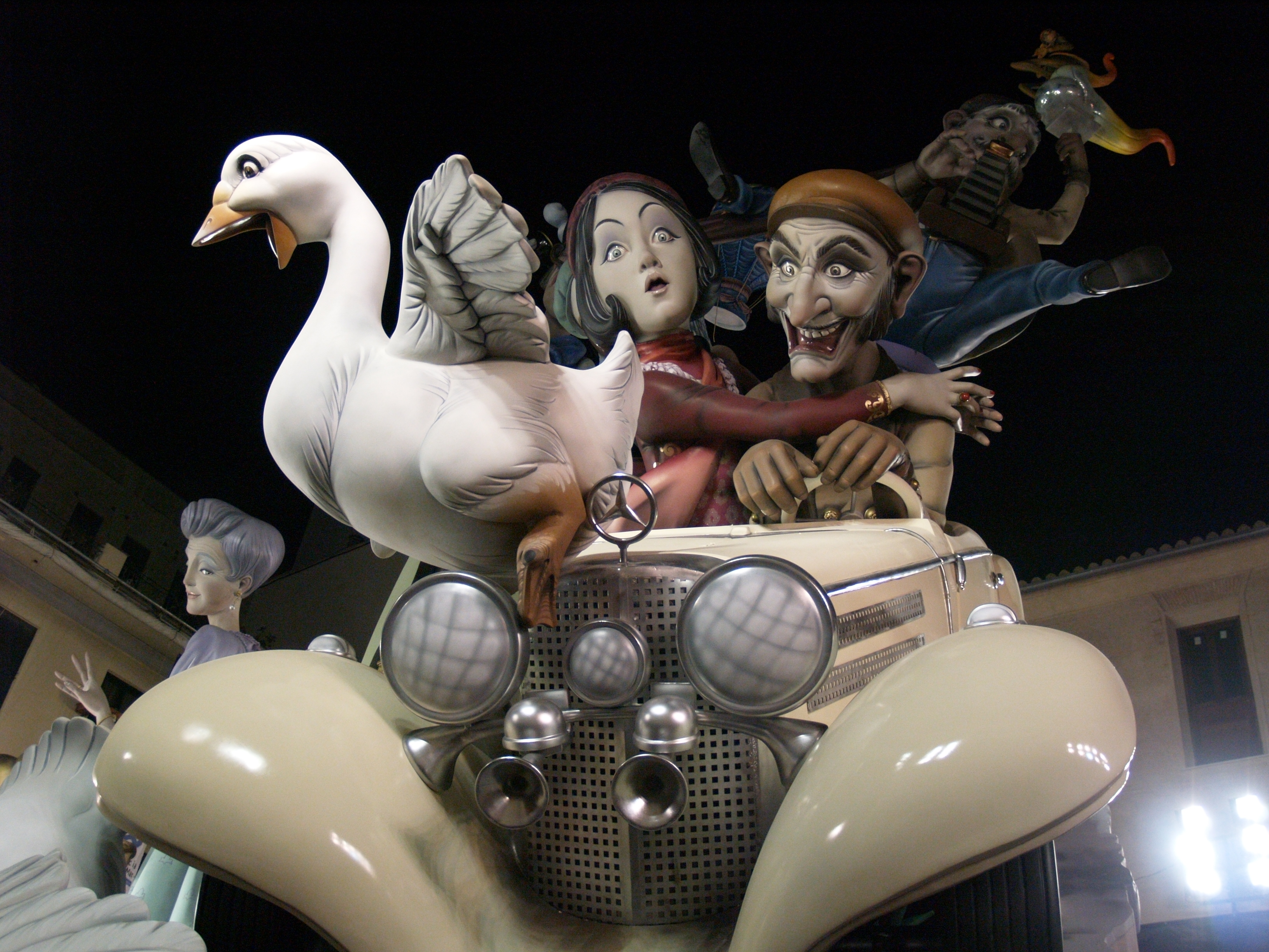 Monumento Fallero del Pilar, Valencia, año 2010